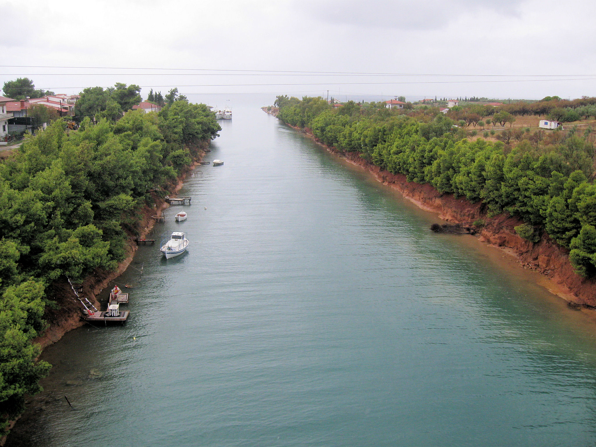 Kanal von Potidea (aus Ost)